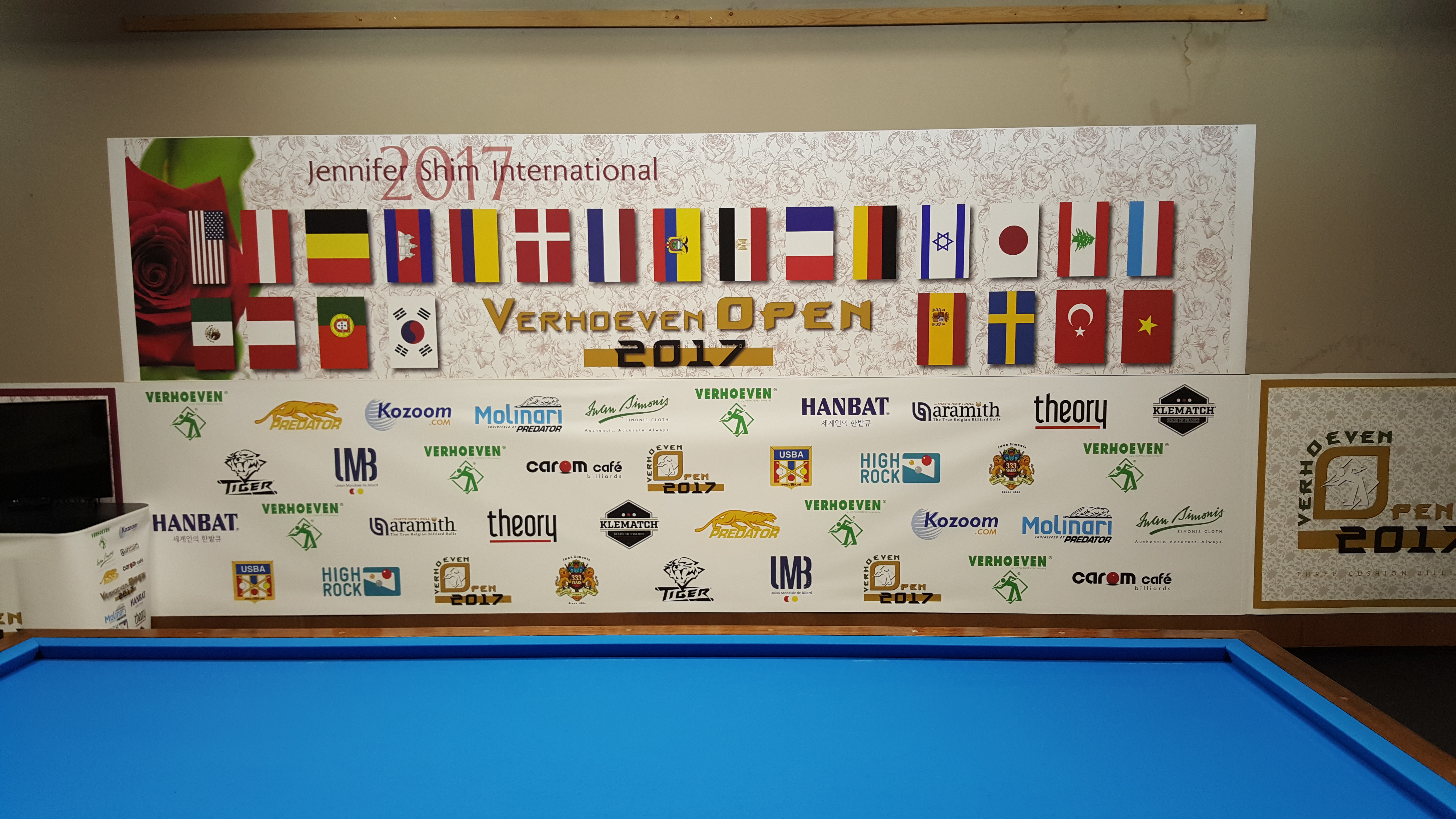 see file name